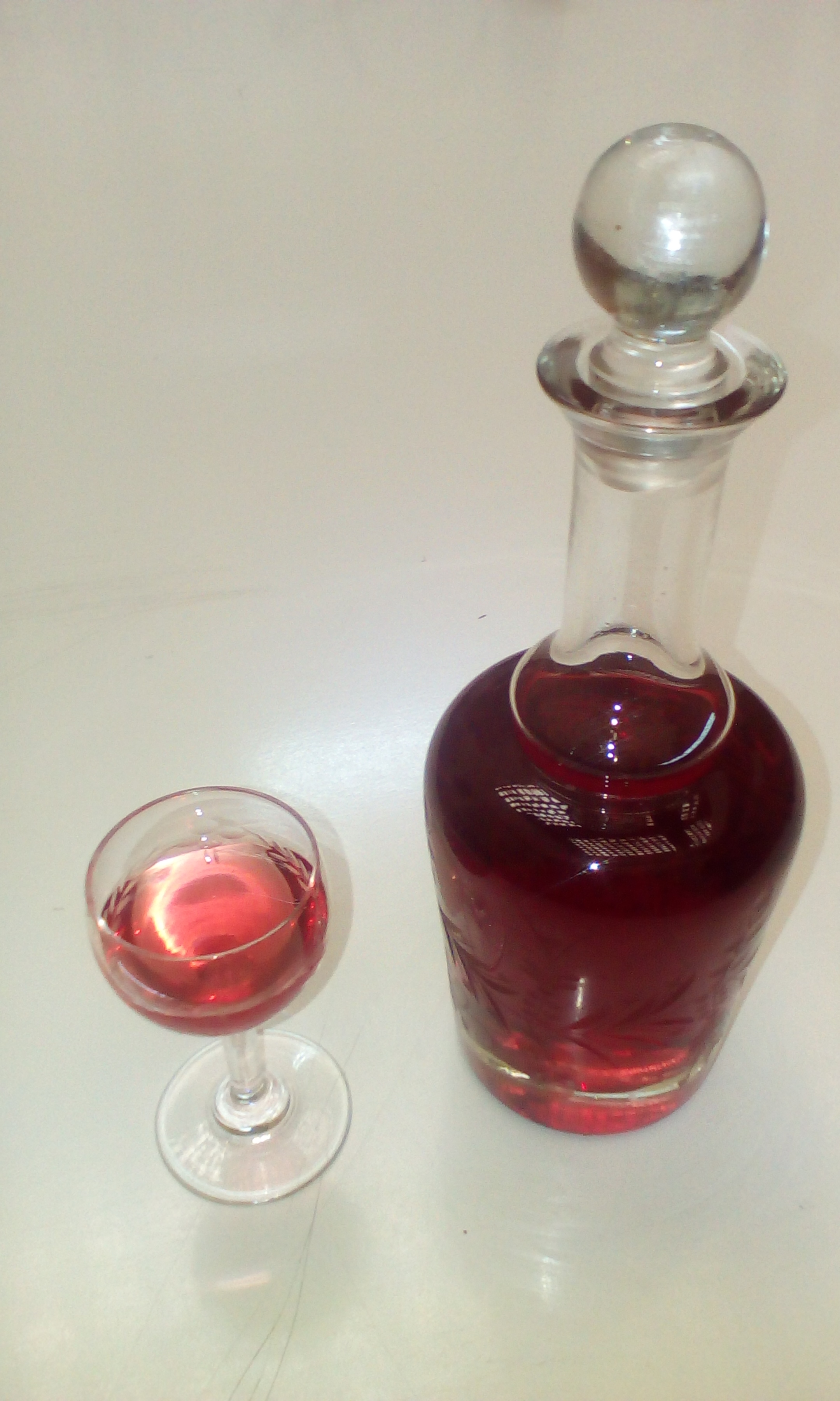 λικέρ αρμπαρόριζα